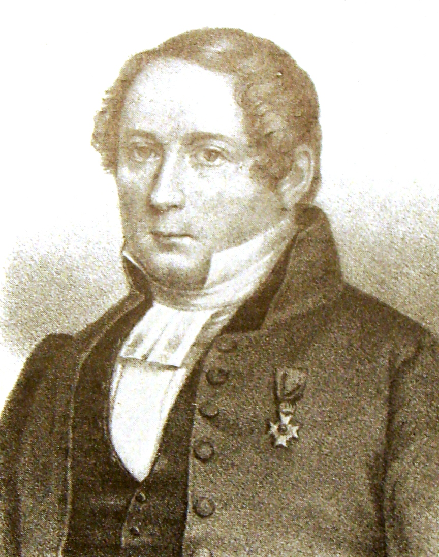 Anders Abraham Grafström. Photocopy.